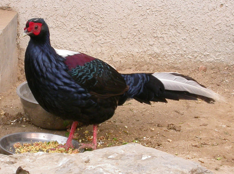 篮鹇，摄于北京动物园，自己拍，本图片不允许百度百科使用 Bân-lâm-gú: Ka-kí tī Pak-kiann tōng-bu̍t-hn̂g hip ê huâ-ke. Tsit tiunn siòng bô ún-tsún Pah-tōo Pah-kho sú-iōng. 家己佇北京動物園翕的華雞，這張相無允准百度百科使用。